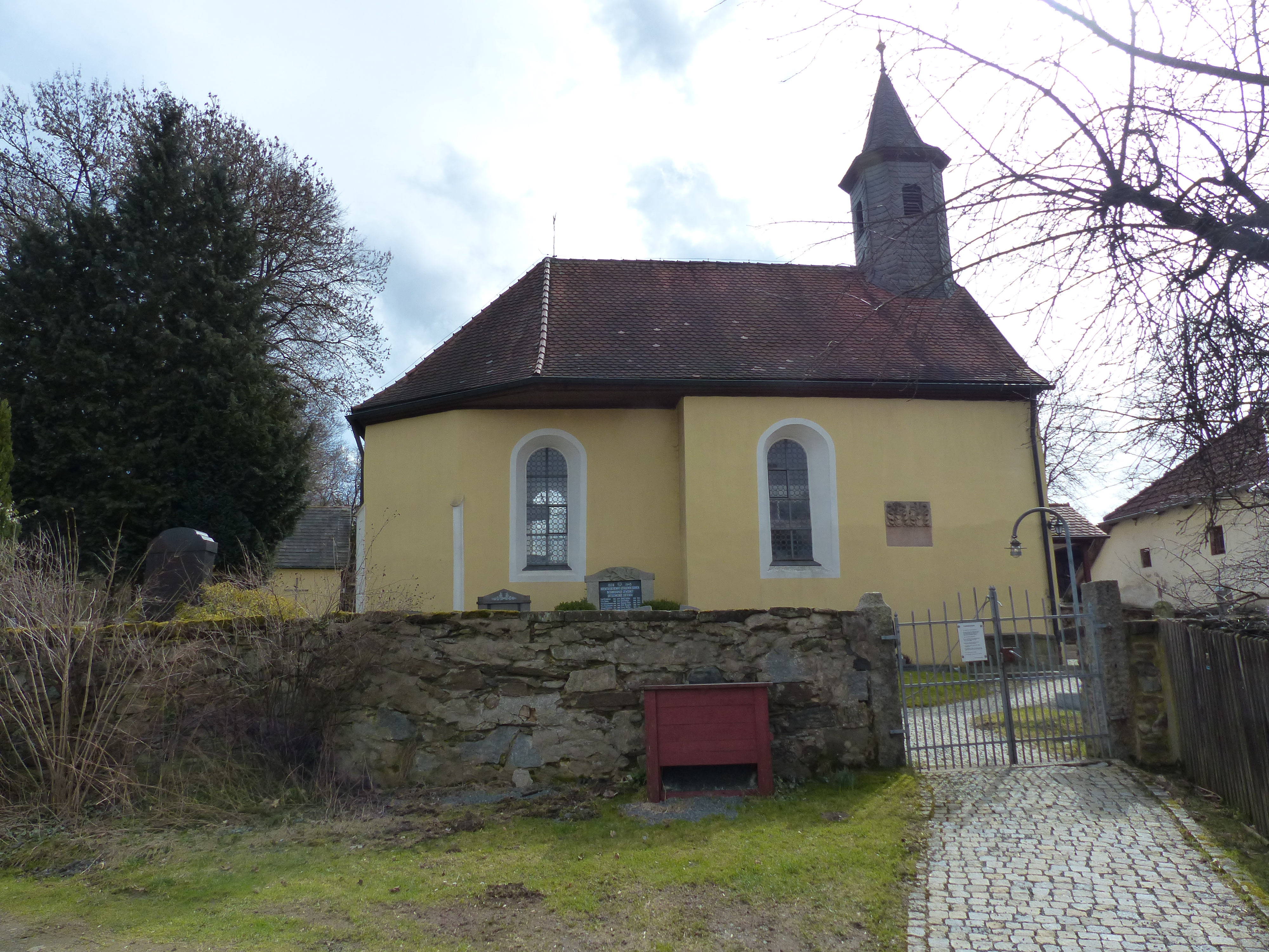 Ansicht von Cottenau, Kirche